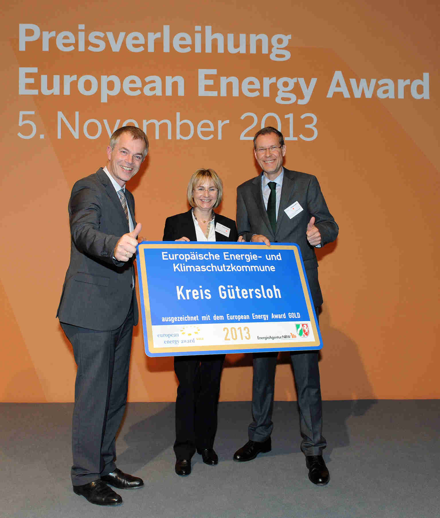 European Energy Award 2013 European Energy Award (EEA) , Turbinenhalle Düsseldorf, 5. November 2013 Gütersloh © EnergieAgentur.NRW. Der Abdruck ist frei. Flickr tags: Nordrhein-Westfalen; Deutschland; Düsseldorf; Turbinenhalle; NRW-Klimaschutzminister Johannes Remmel; EnergieAgentur.NRW; Kommunen; Kreise; European Energy Award (EEA); Klimaschutz; Nachhaltigkeit; Städte; Gemeinden; Gold; kommunalen Energiemanagementverfahren